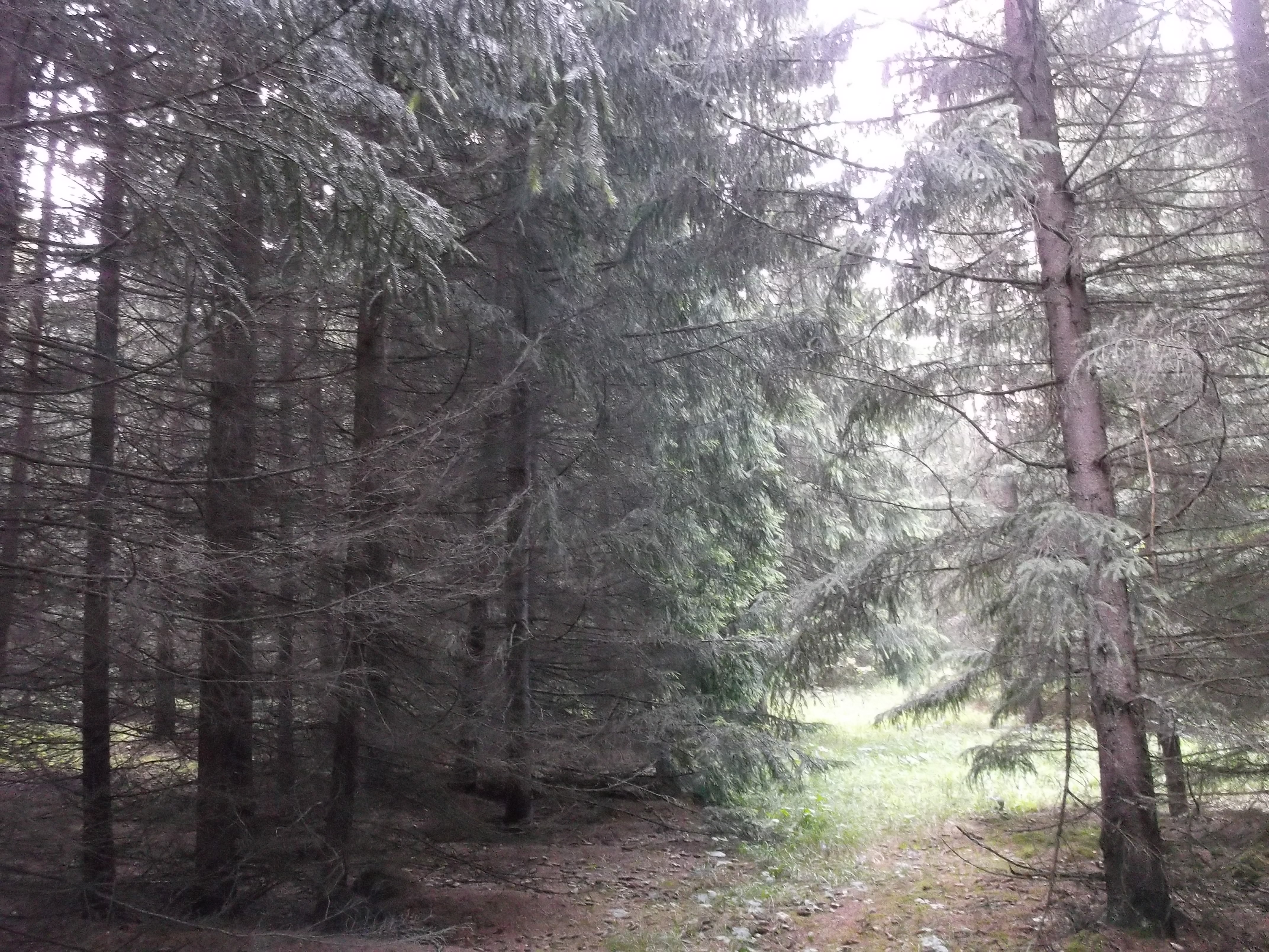 кедры в Травниковском бору